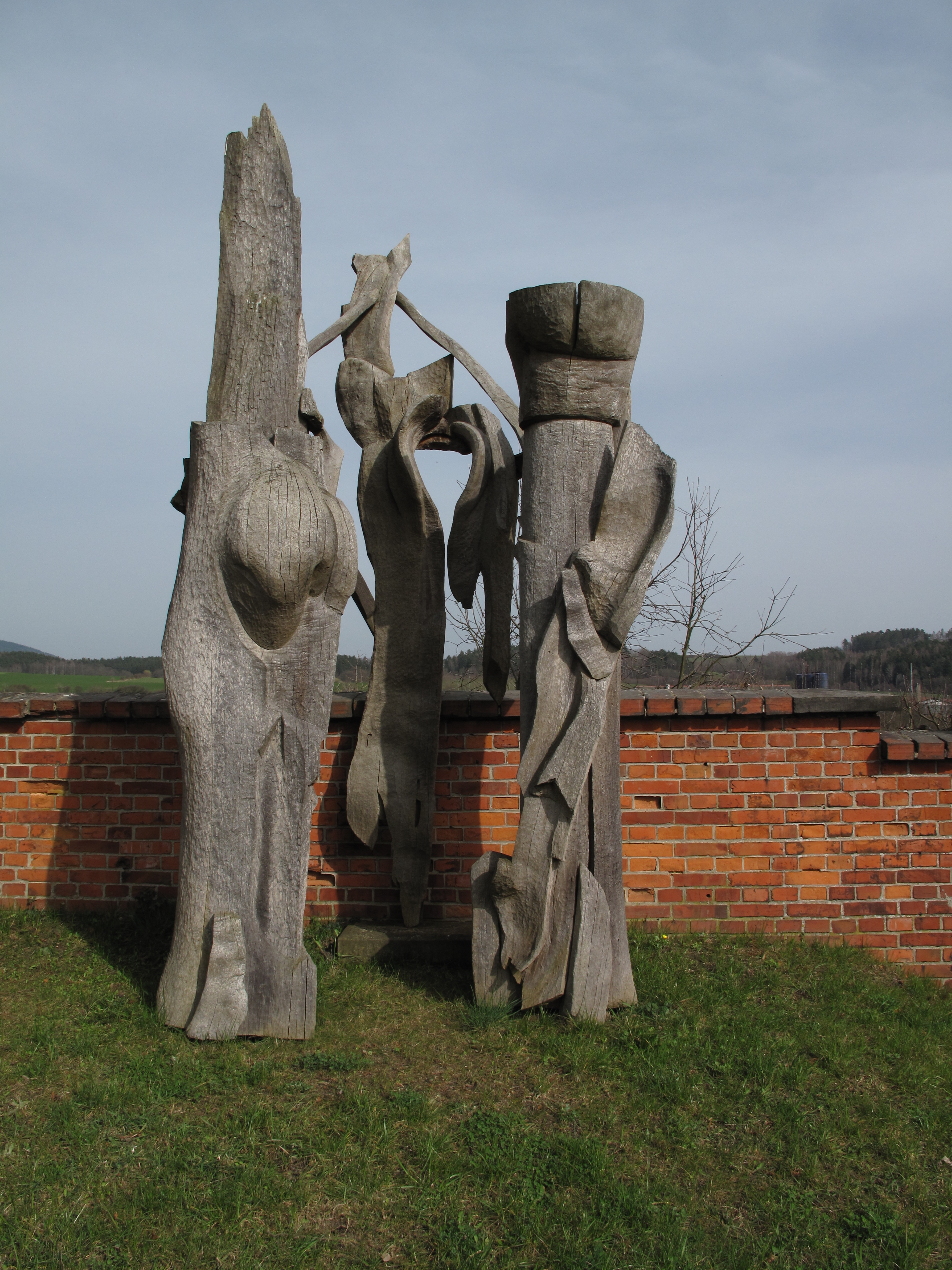 Český Dub II. Okres Liberec, Česká republika.